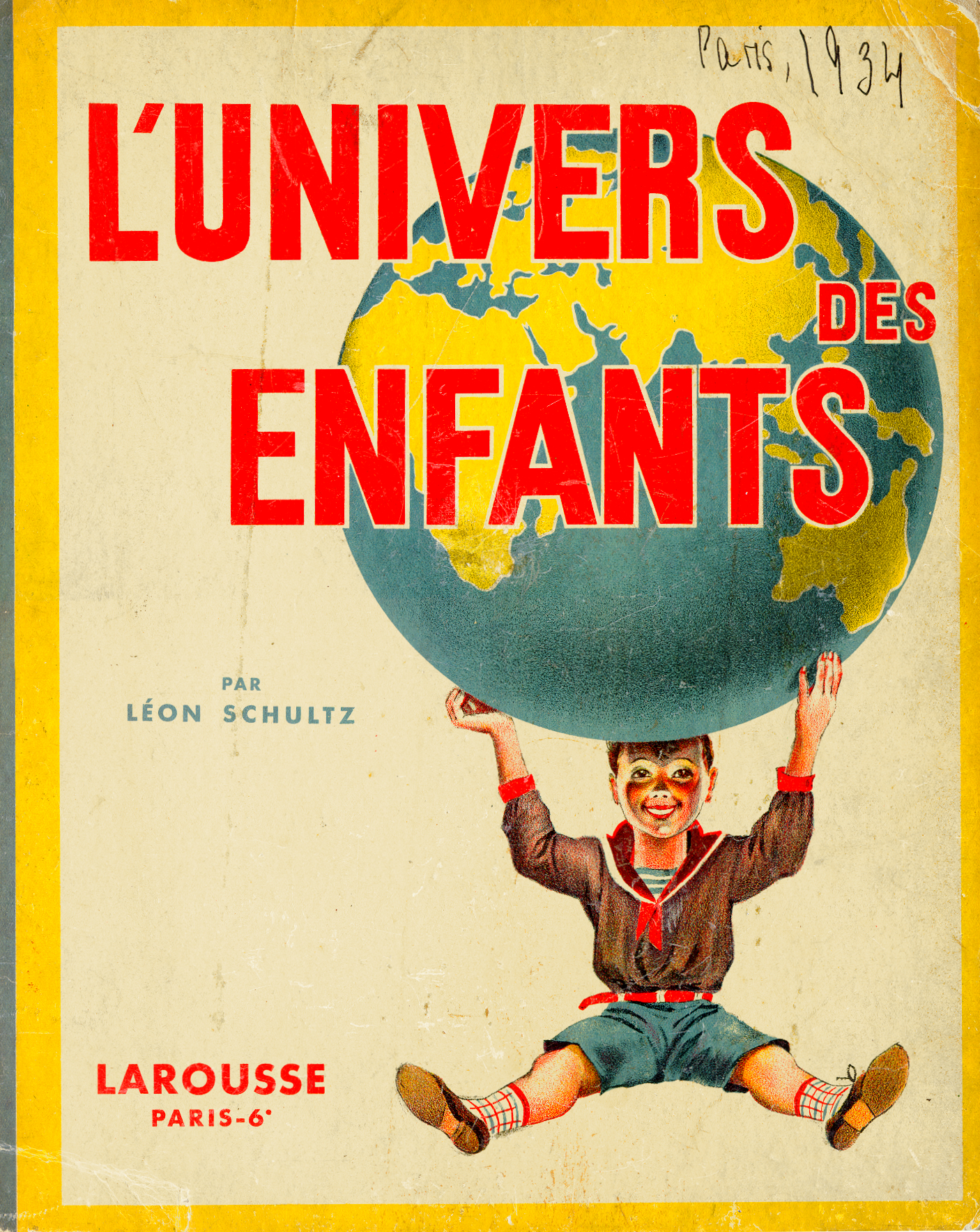 копия обложки книги Льва Шульца "Вселенная детей"